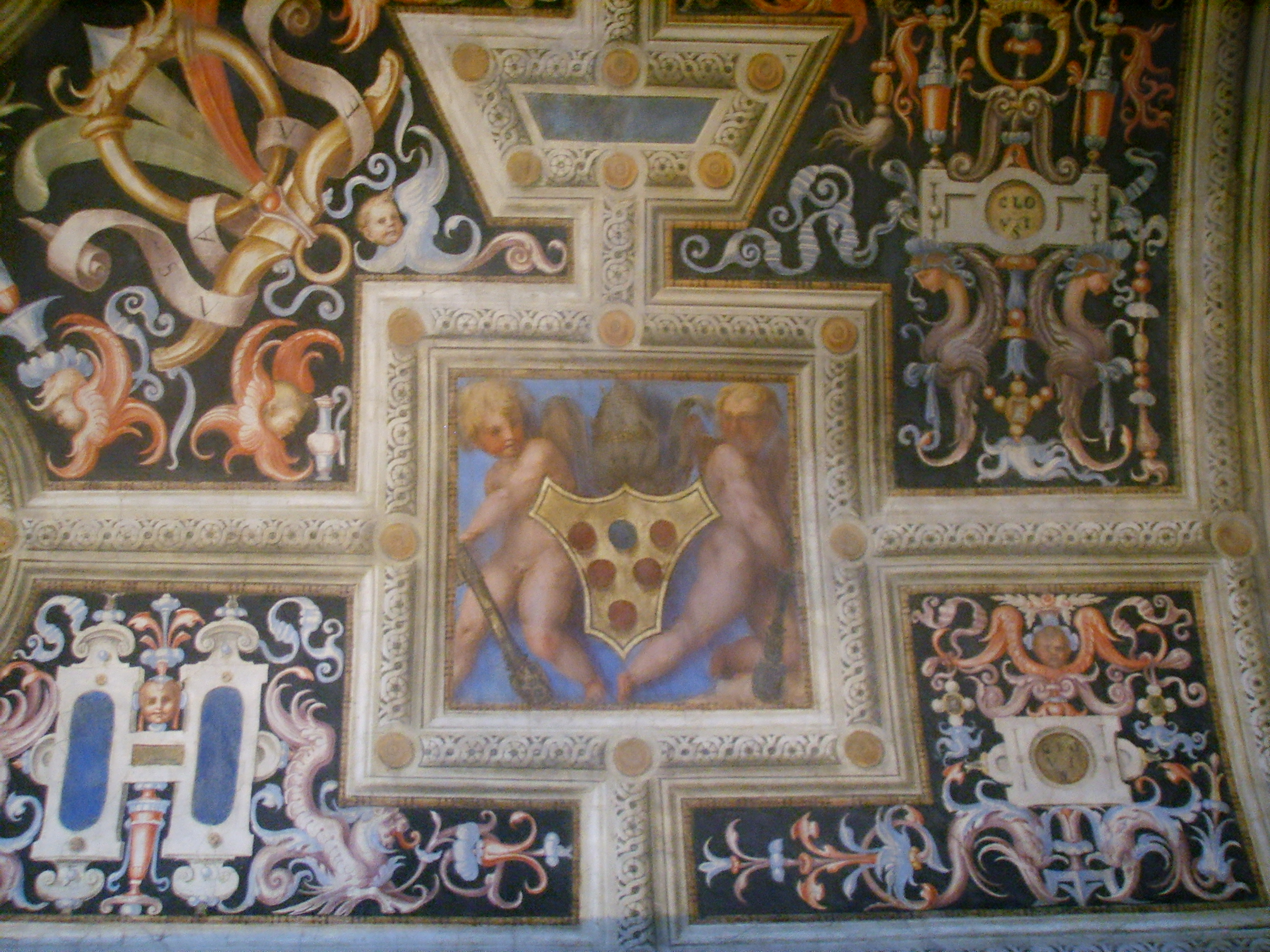 Cappella dei papi in santa Maria Novella church fresco celiling decoration in Florence, Italy